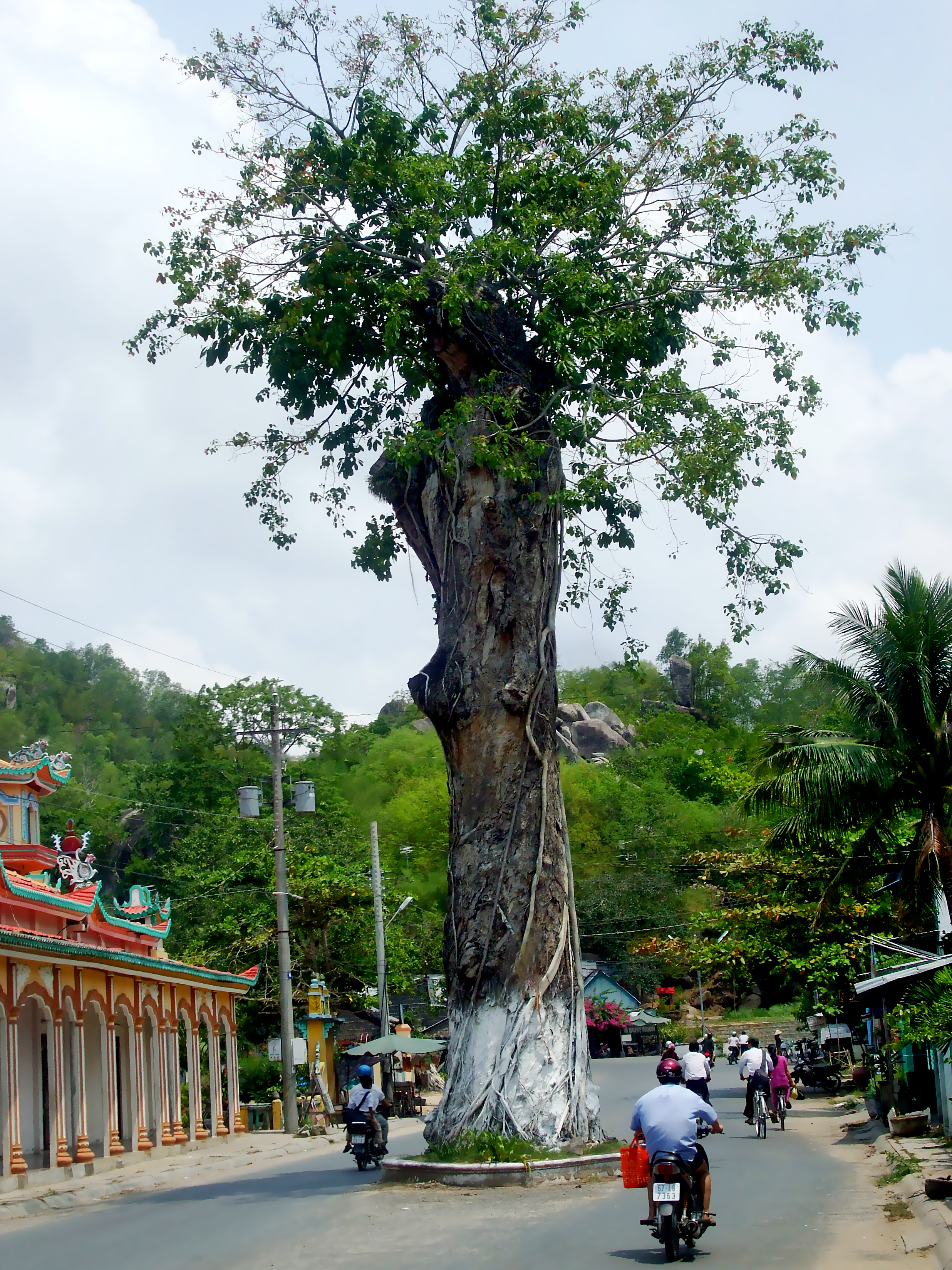 Cây dầu hàng trăm năm tuổi tại chân núi Tượng (Ba Chúc, huyện Tri Tôn, tỉnh An Giang, Việt Nam), gợi nhớ thưở nơi này hãy còn hoang vu.